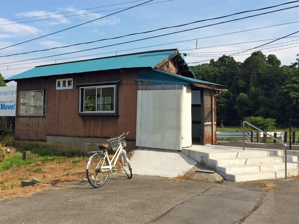 富山地方鉄道本線 長屋駅 駅舎